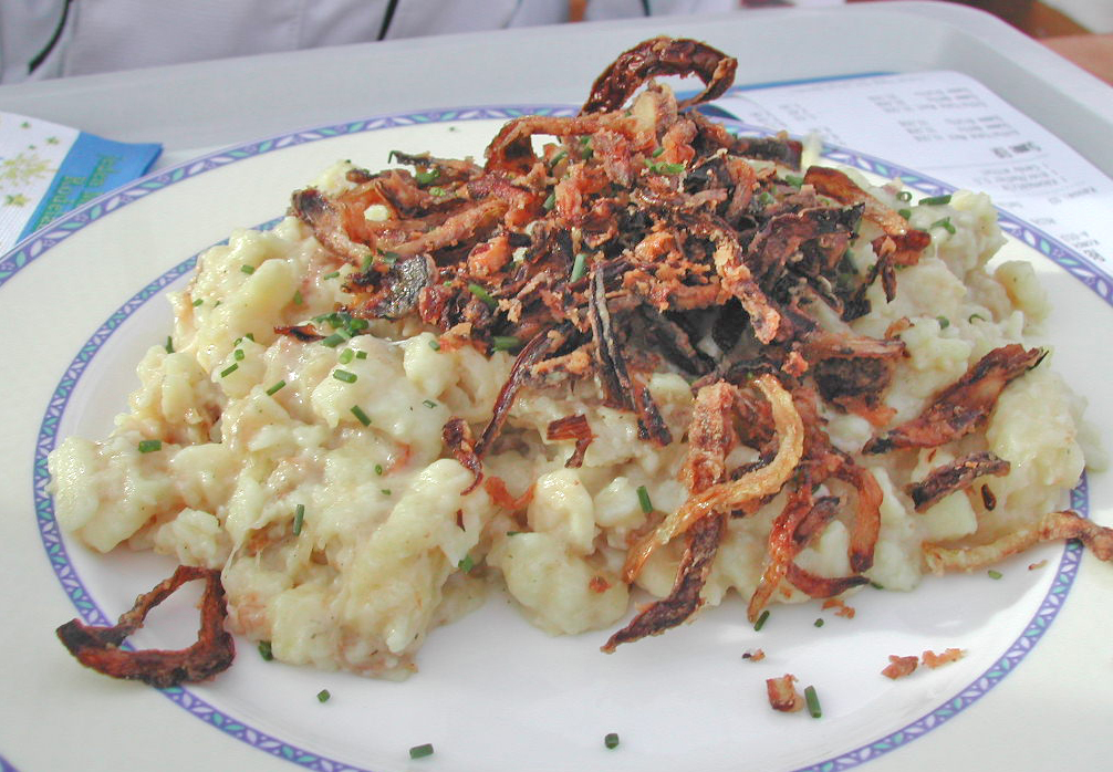 Spätzle mat Ënnen